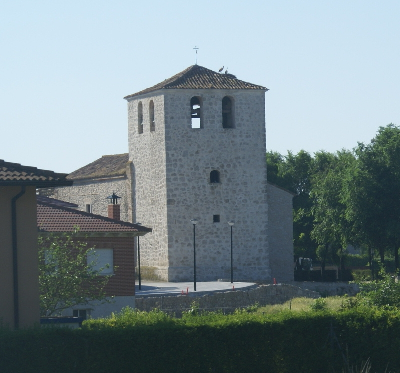 Iglesia de Nuestra Señora del Rosario de Santibáñez de Valcorba.